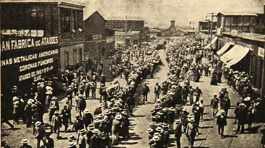 Imagen extraída del libro La masacre de la escuela Santa María de Iquique- Operarios en huelga abriendo calle para recibir a los obreros de la pampa, 1907.